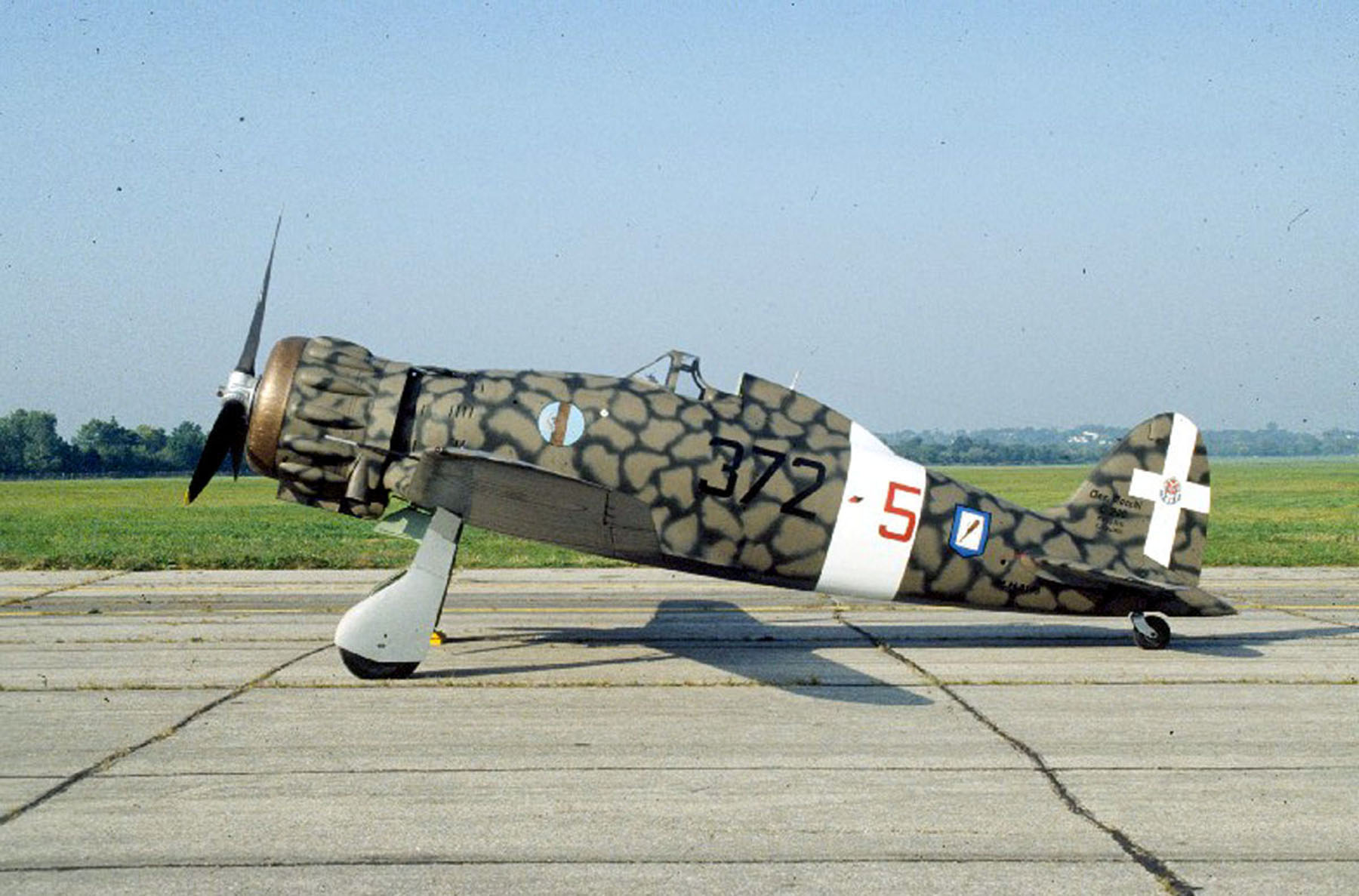 Macchi MC-200 Saetta